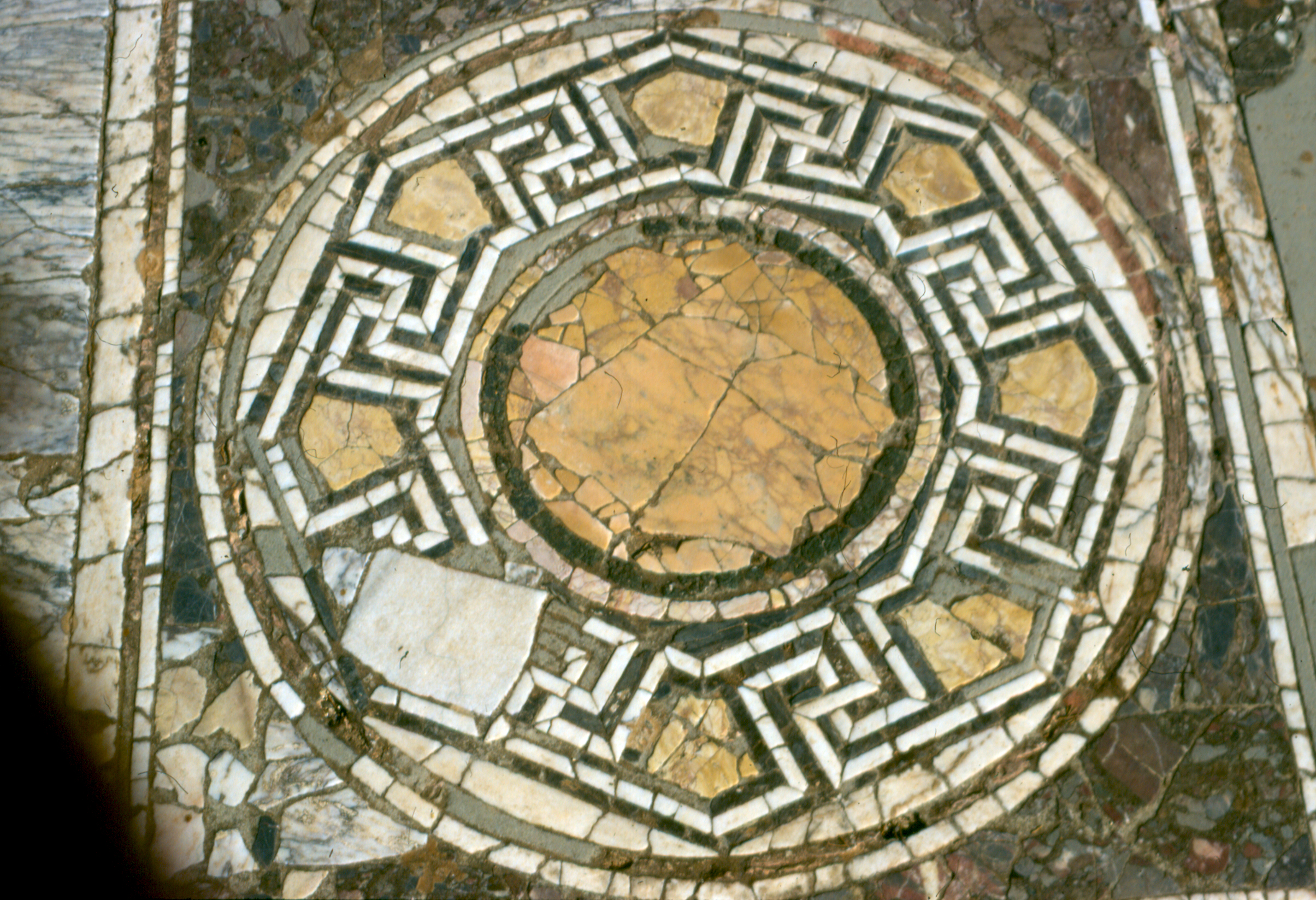 Libia, Cirene (sito archeologico), Insula di Giasone Magno, Triclinio estivo, pavimentazione in opus sectile, particolare